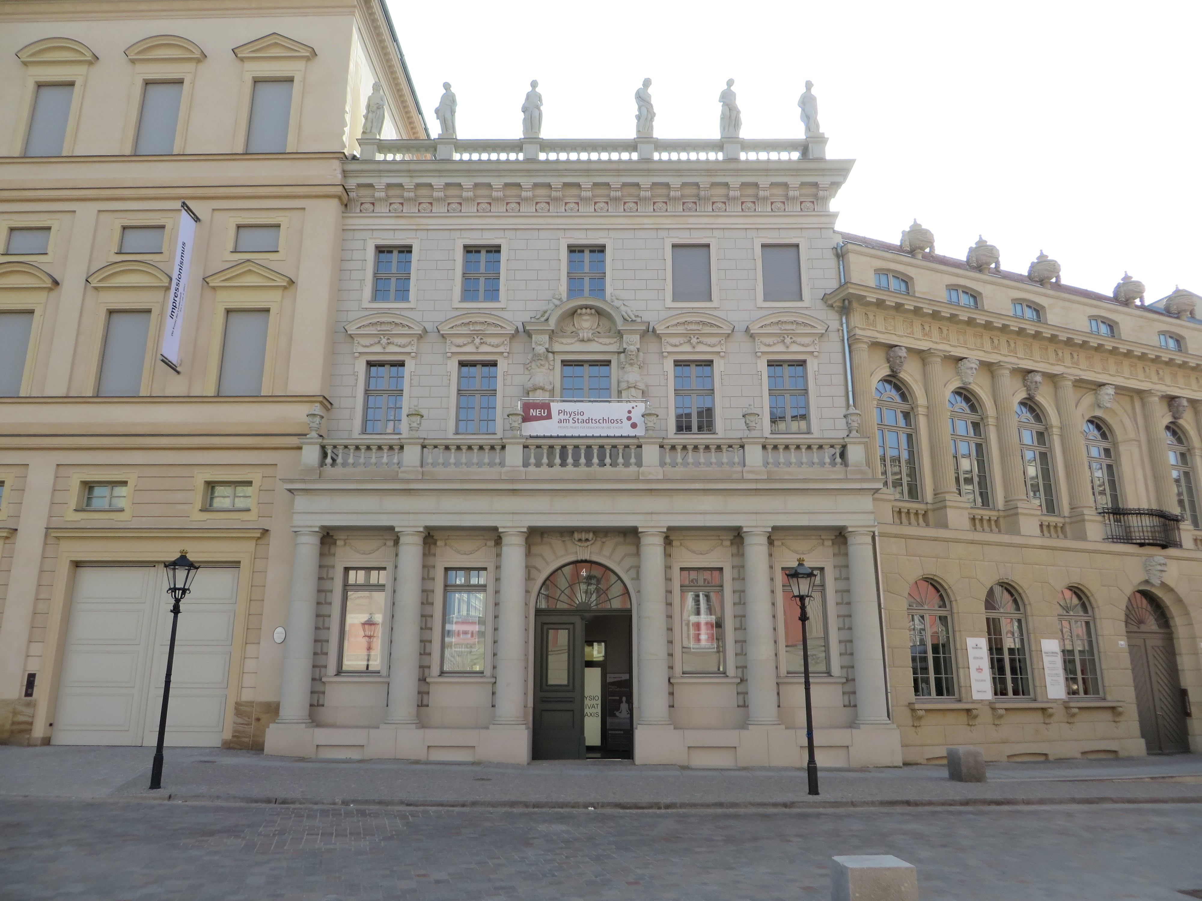 Palazzo Chiericati, Potsdam 03/2017